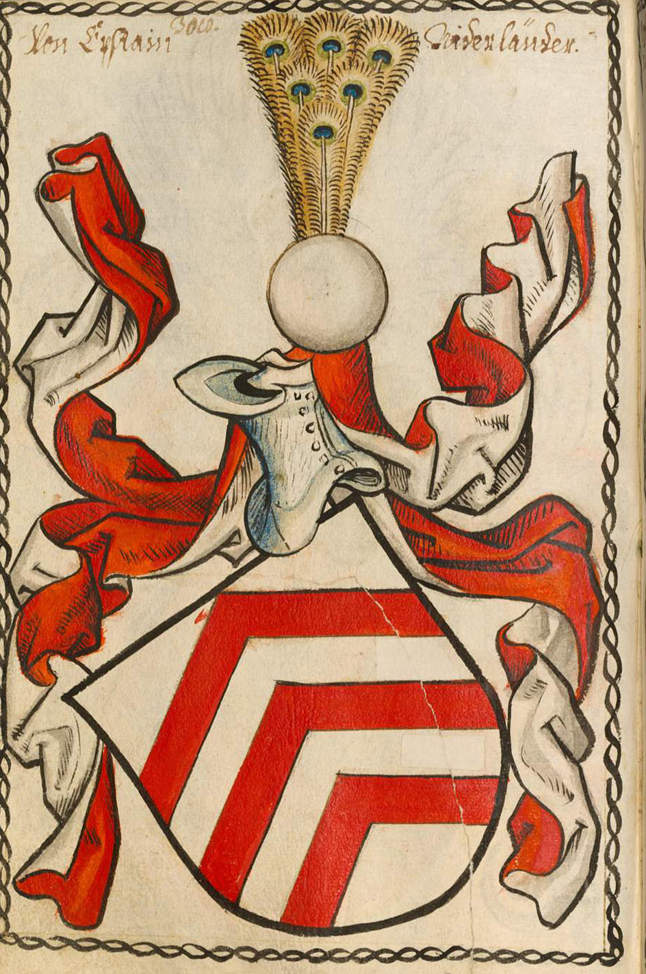 Scheibler'sches Wappenbuch , älterer Teil; Seite 308 Von Epstain Niederländer